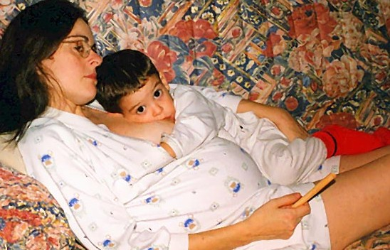 Lactancia materna